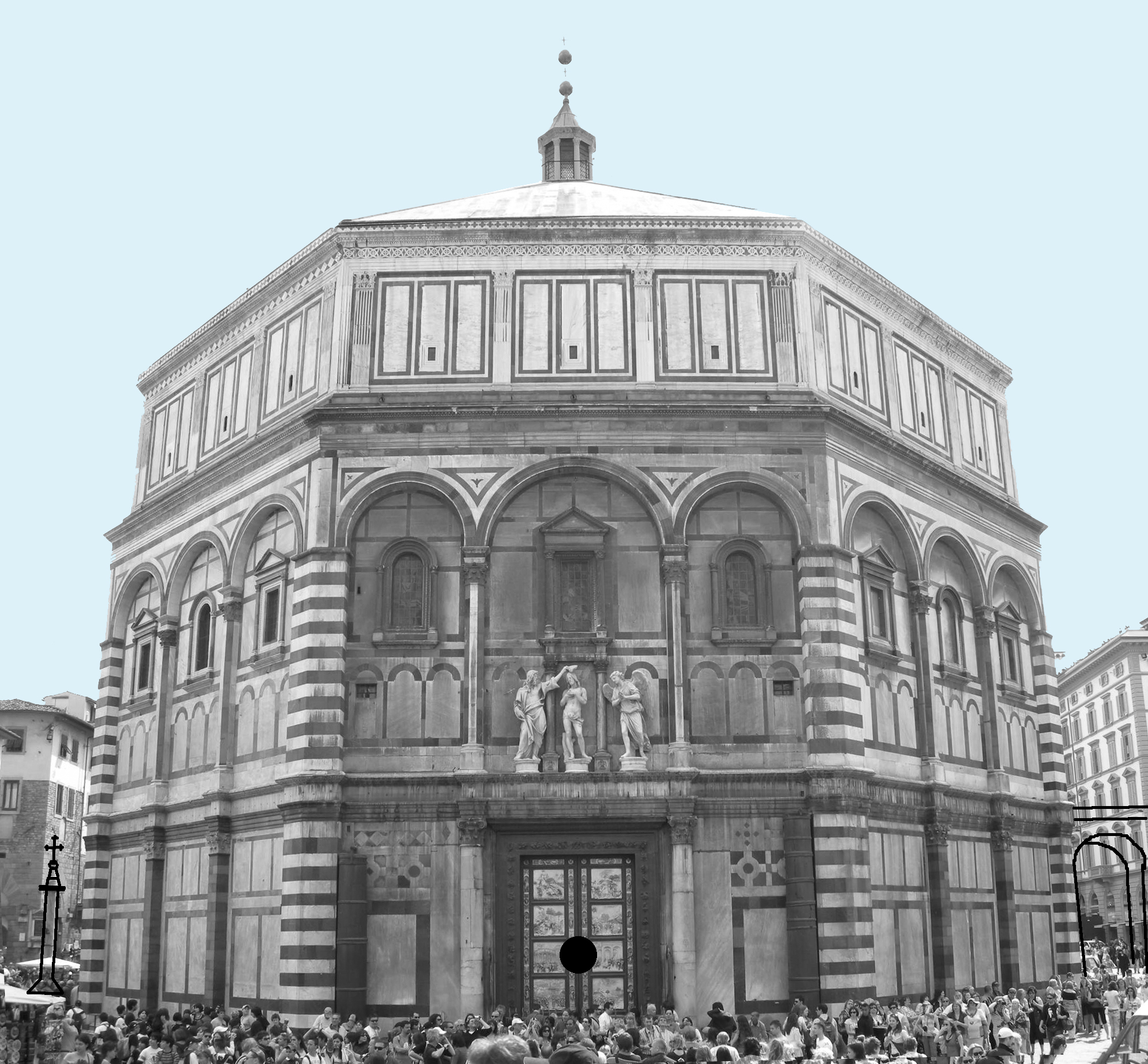 Ricostruzione della tavoletta prospettica del battistero di Brunelleschi